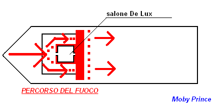 Disegno propagazione delle fiamme sul traghetto Moby Prince